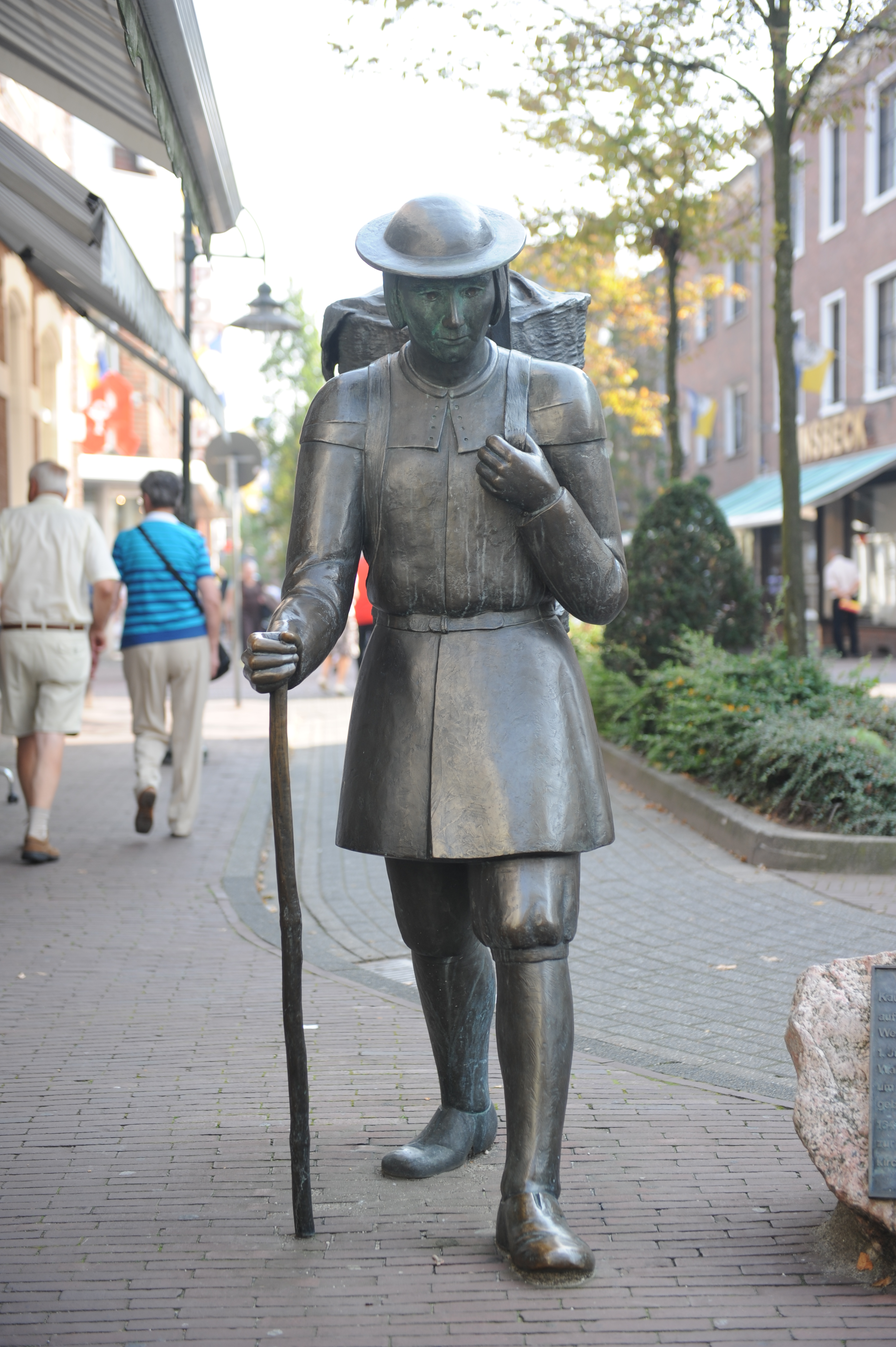 Kevelaer, Busmannstraße; Hendrick Busmann von Erika Rutert, augestellt in 1989